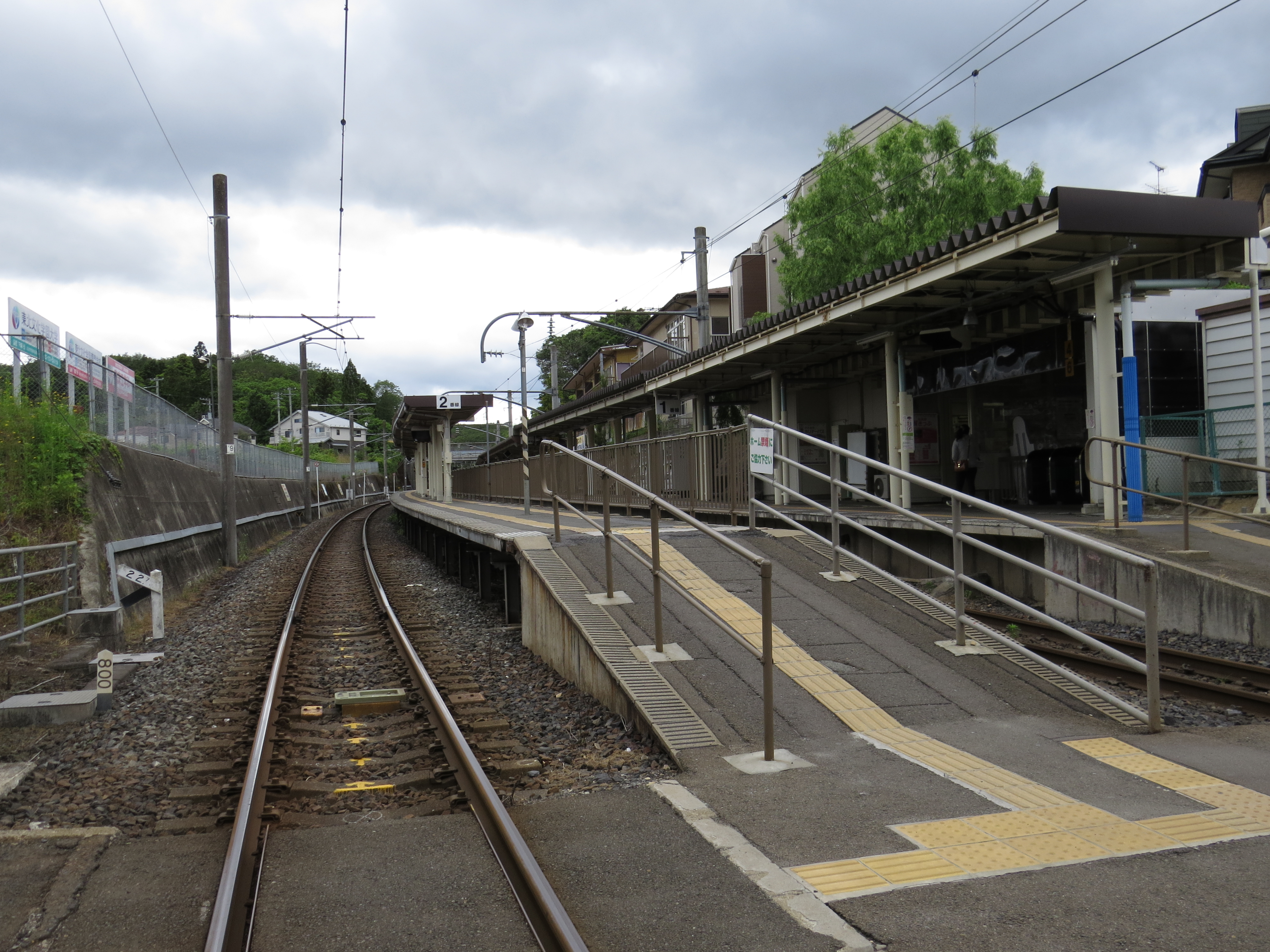 JR東日本 国見駅構内